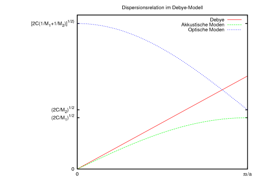 Dispersionsrelation einer 2 atomigen Basis mit entarteten akustischen und optischen Moden.